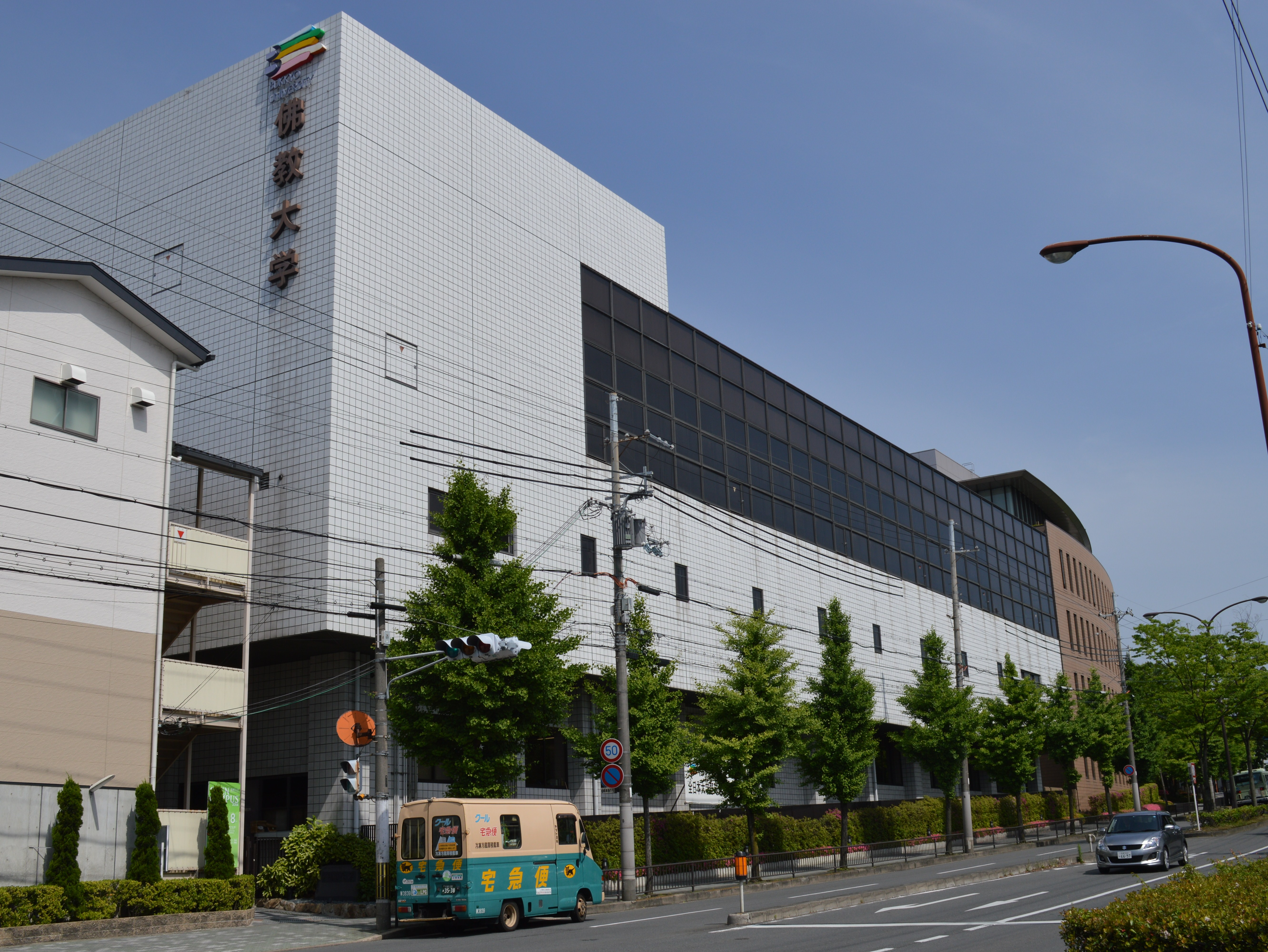 京都市北区紫野 佛教大学紫野キャンパス 鷹陵館（中央）と13号館（左端）と北大路通（手前）